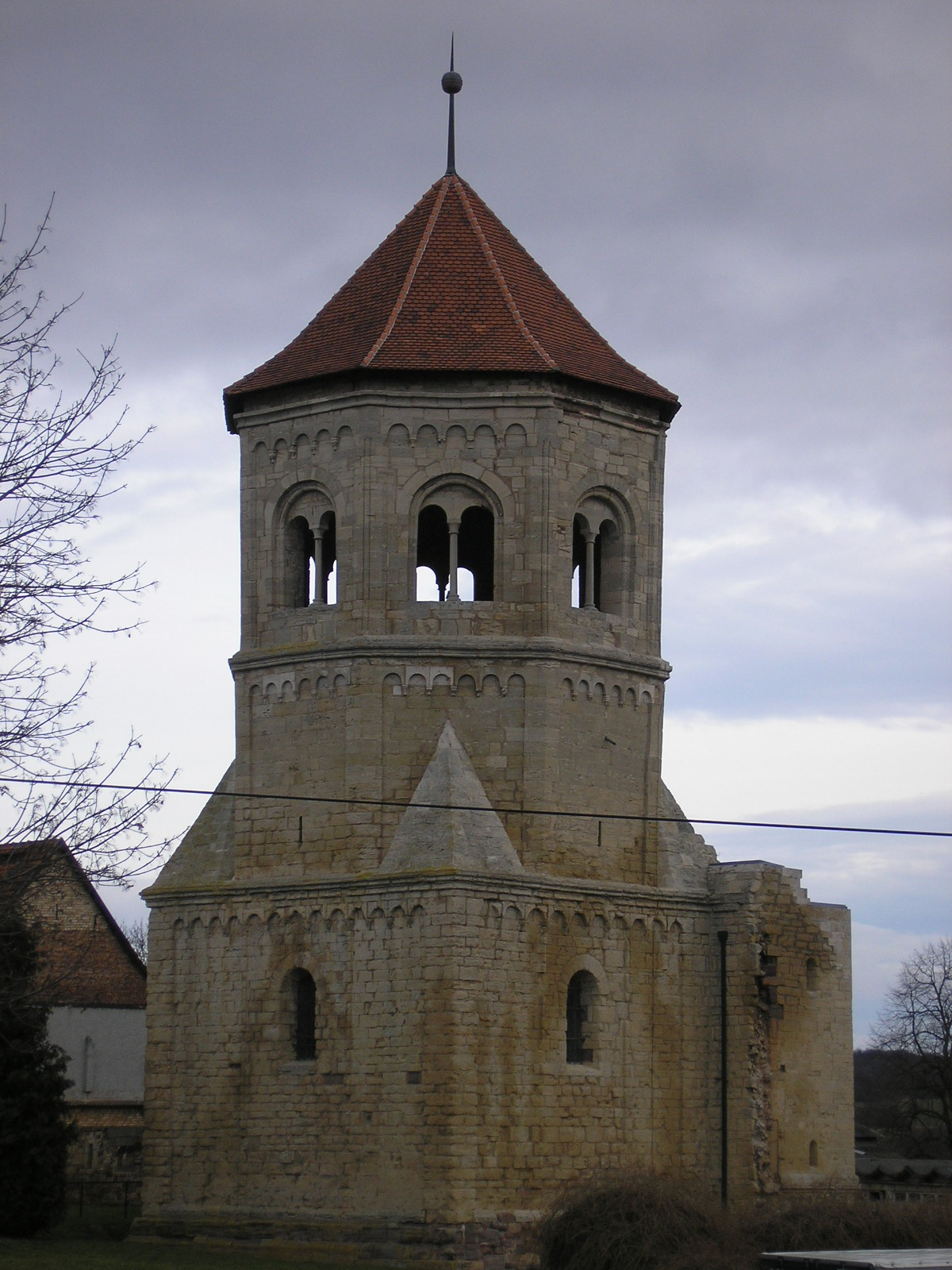 Ruine des Klosters Göllingen (Thüringen), Westansicht.